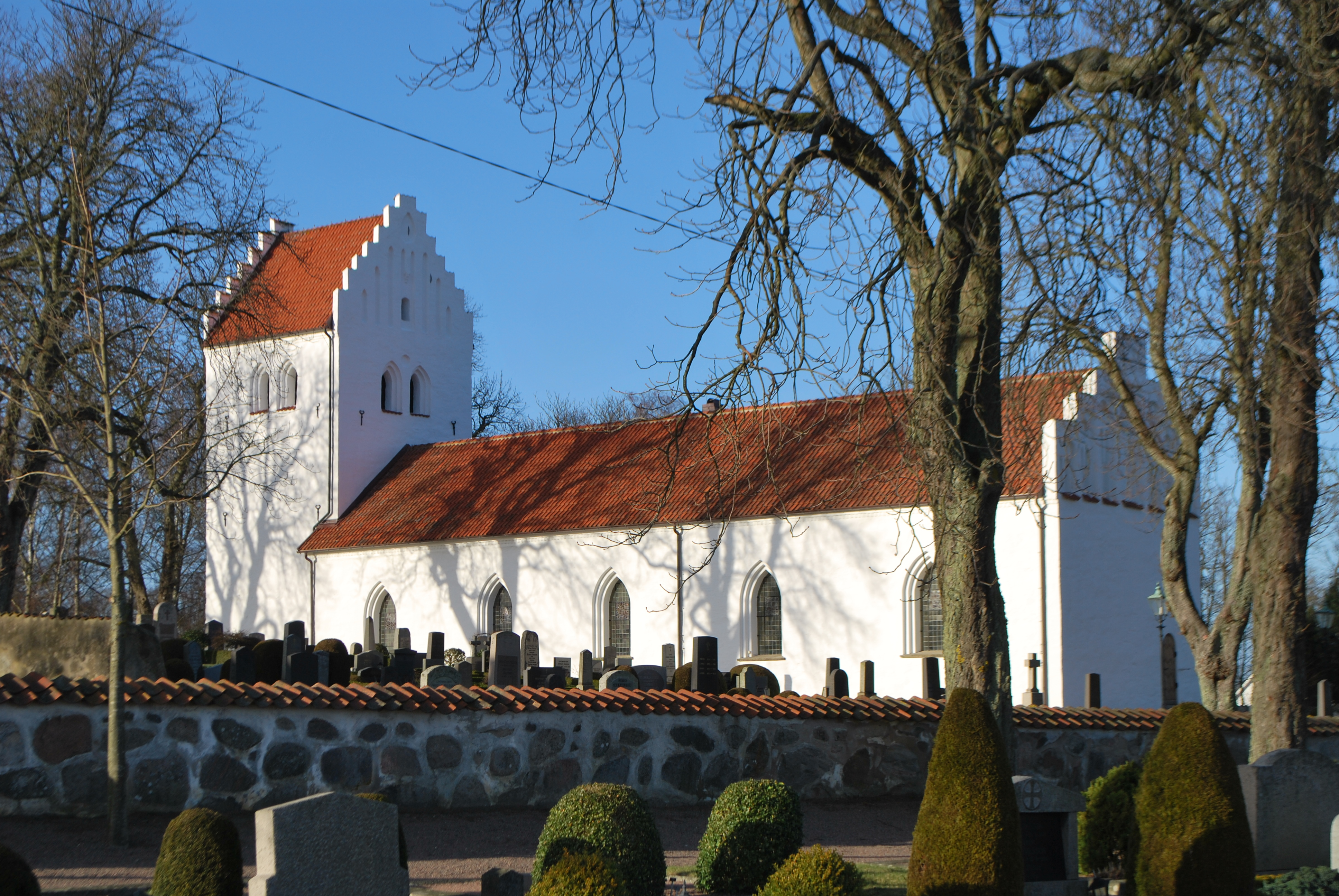 Barkåkra kyrka, fasad mot sydöst